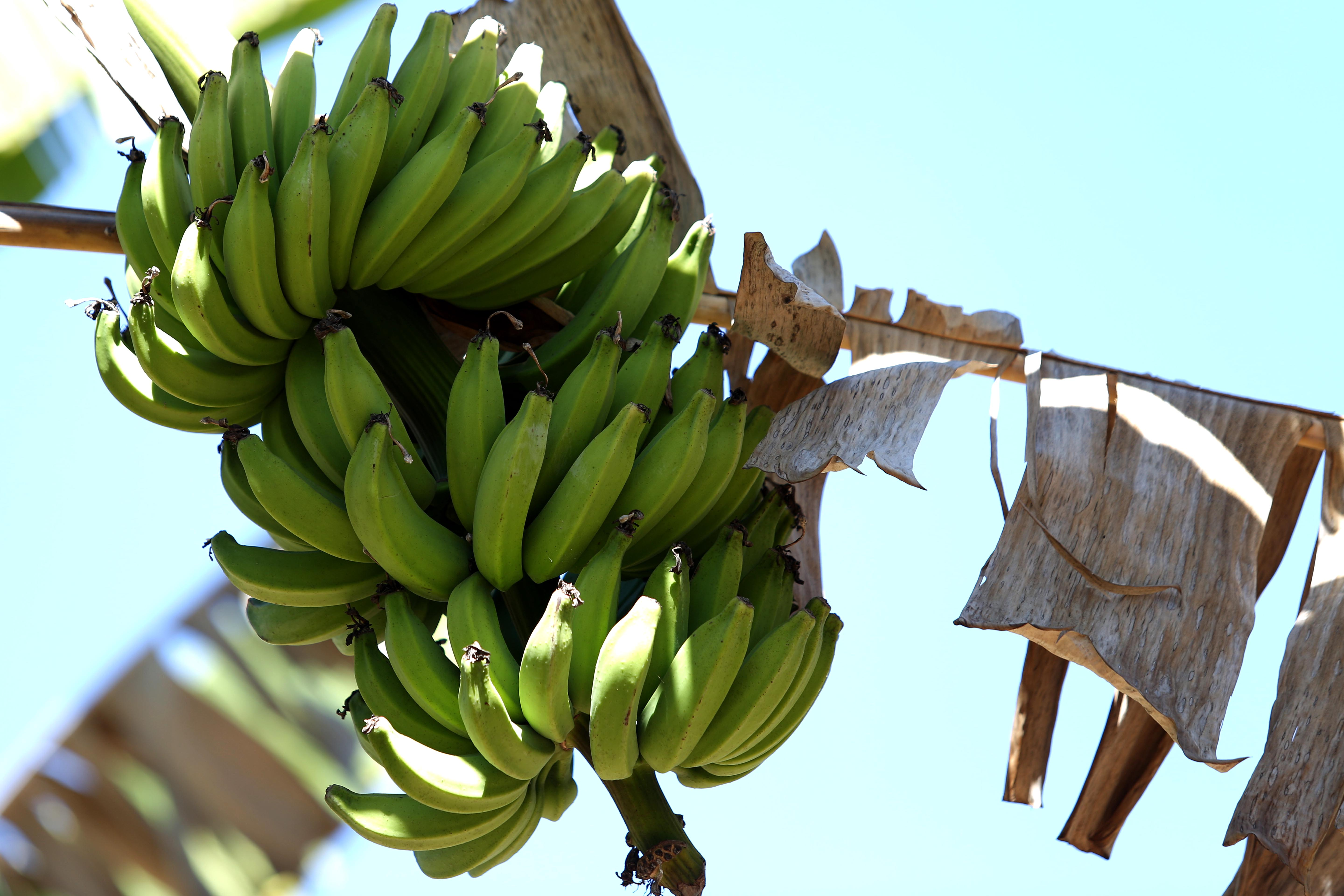 Assentamento Contagem, Fercal, Brasília, DF, Brasil 27/6/2016 Foto: Dênio Simões/Agência Brasília. O produtor de bananas Fábio Luiz Valença, de 35 anos, pretende utilizar a carta de crédito do Prospera DF para expandir a plantação e variar o tipo da fruta cultivada no Assentamento Contagem, na Fercal. Cacho de bananas da variedade Pacovan . Leia a matéria no site da Agência Brasília: bit.ly/299mH05